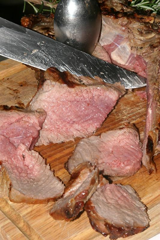 La Tagliata